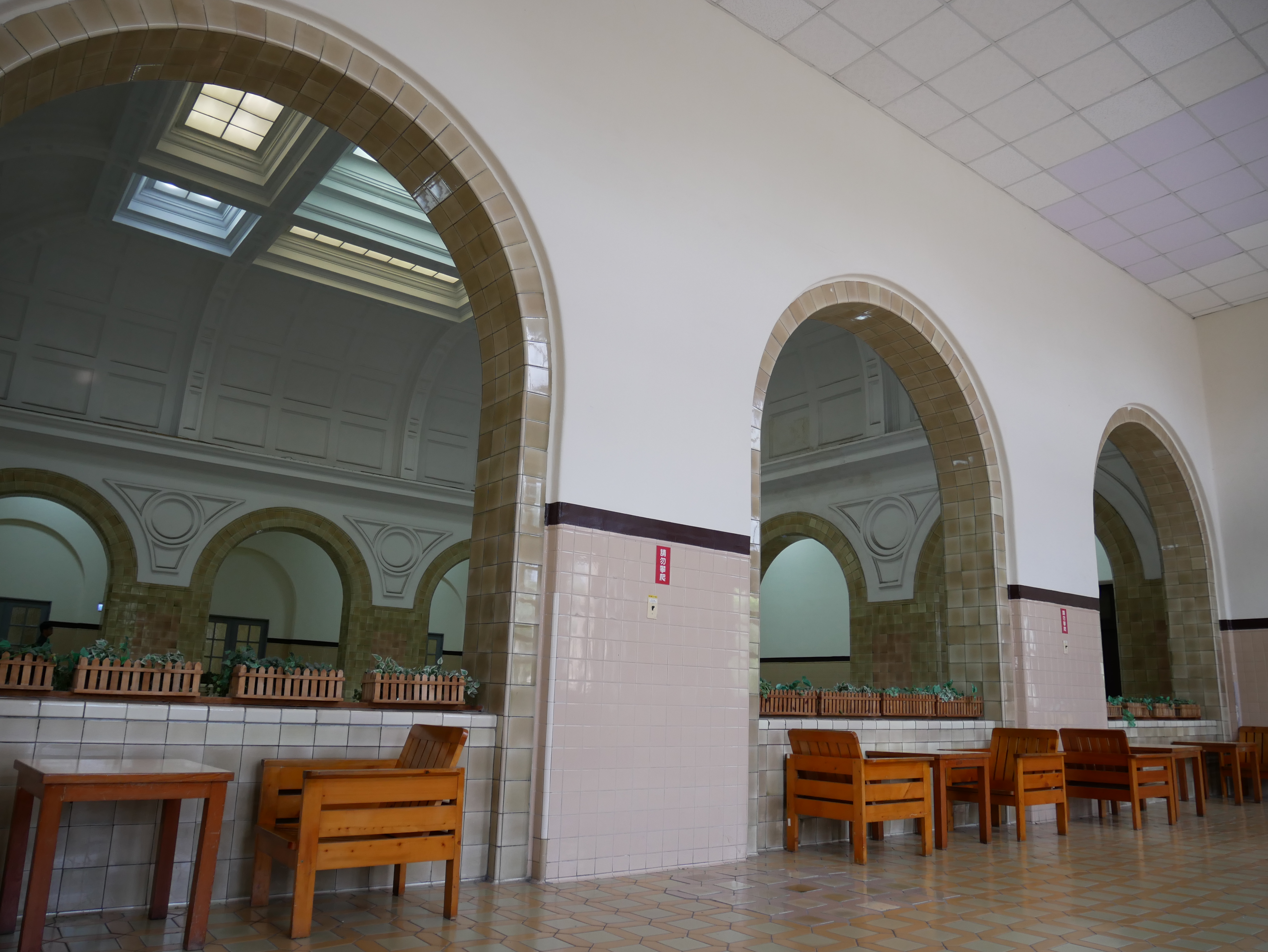 中文（台灣）: 臺北帝國大學醫學部附屬病院二樓拱圈，臺北市中正區城內次分區黎明里